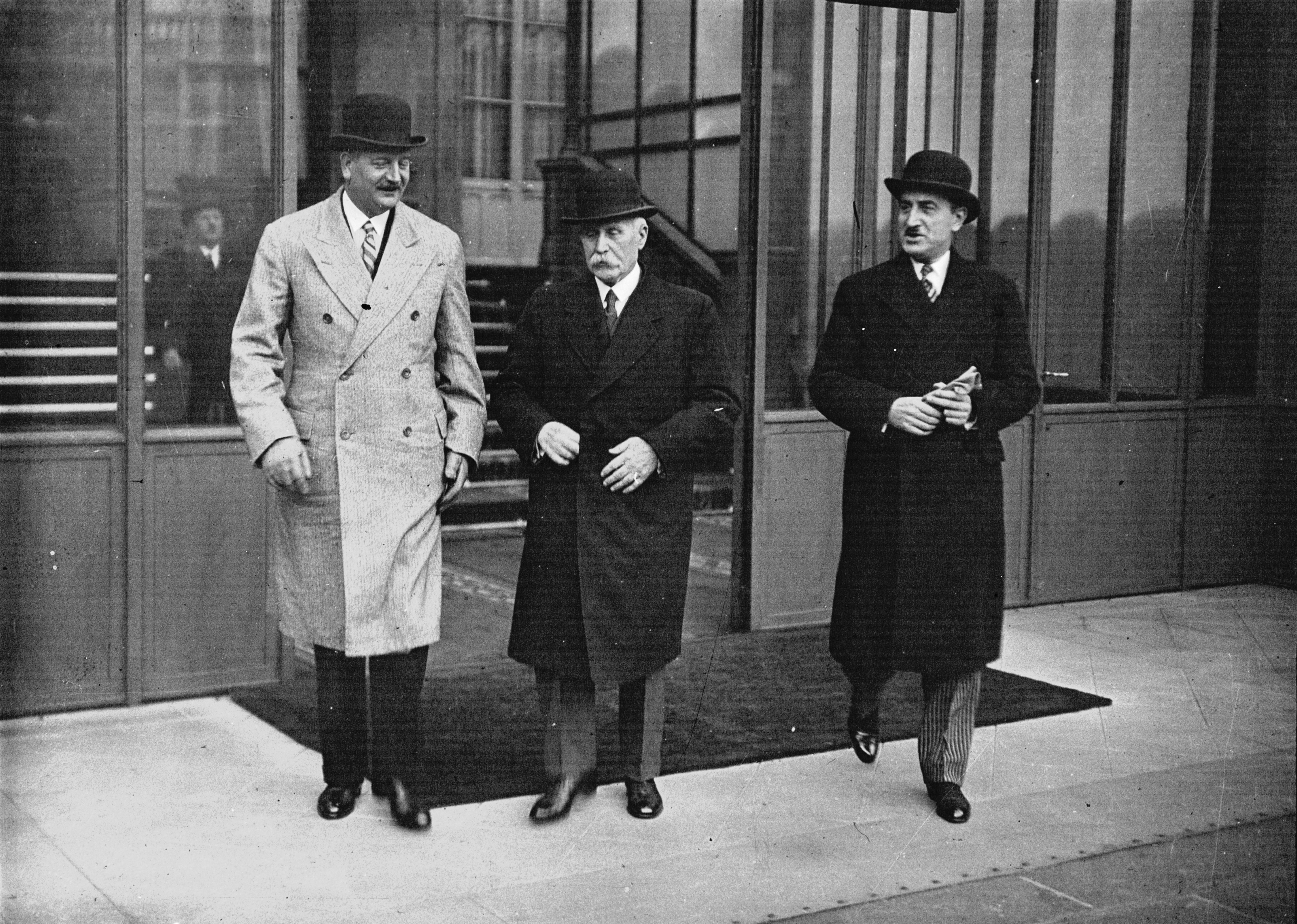 Crise ministérielle : de gauche à droite, Flandin, Pétain, Marquet [photographie de presse]